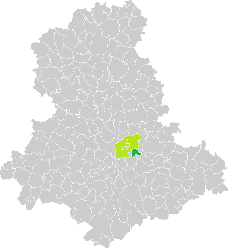 Carte de situation de la commune d'Aureil (en vert foncé) dans le votre Canton (en vert clair) sur une carte des communes de la Haute-Vienne